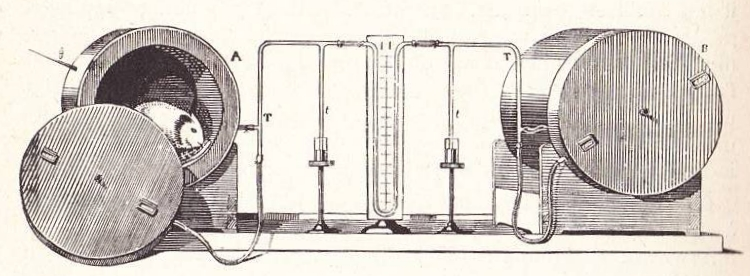 Calorimètre D'Arsonval 1884. Auteur meer dan 70 jaar dood